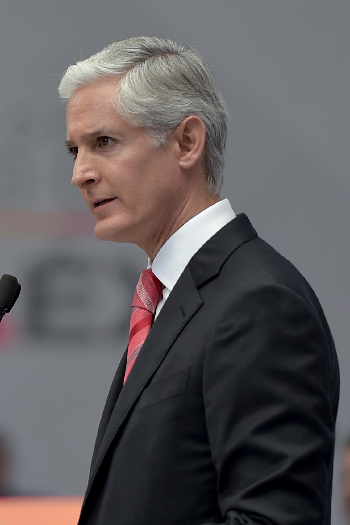 Alfredo del Mazo Maza